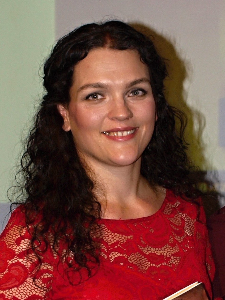 Fotografie pořízená na křtu knihy Nezlomný.